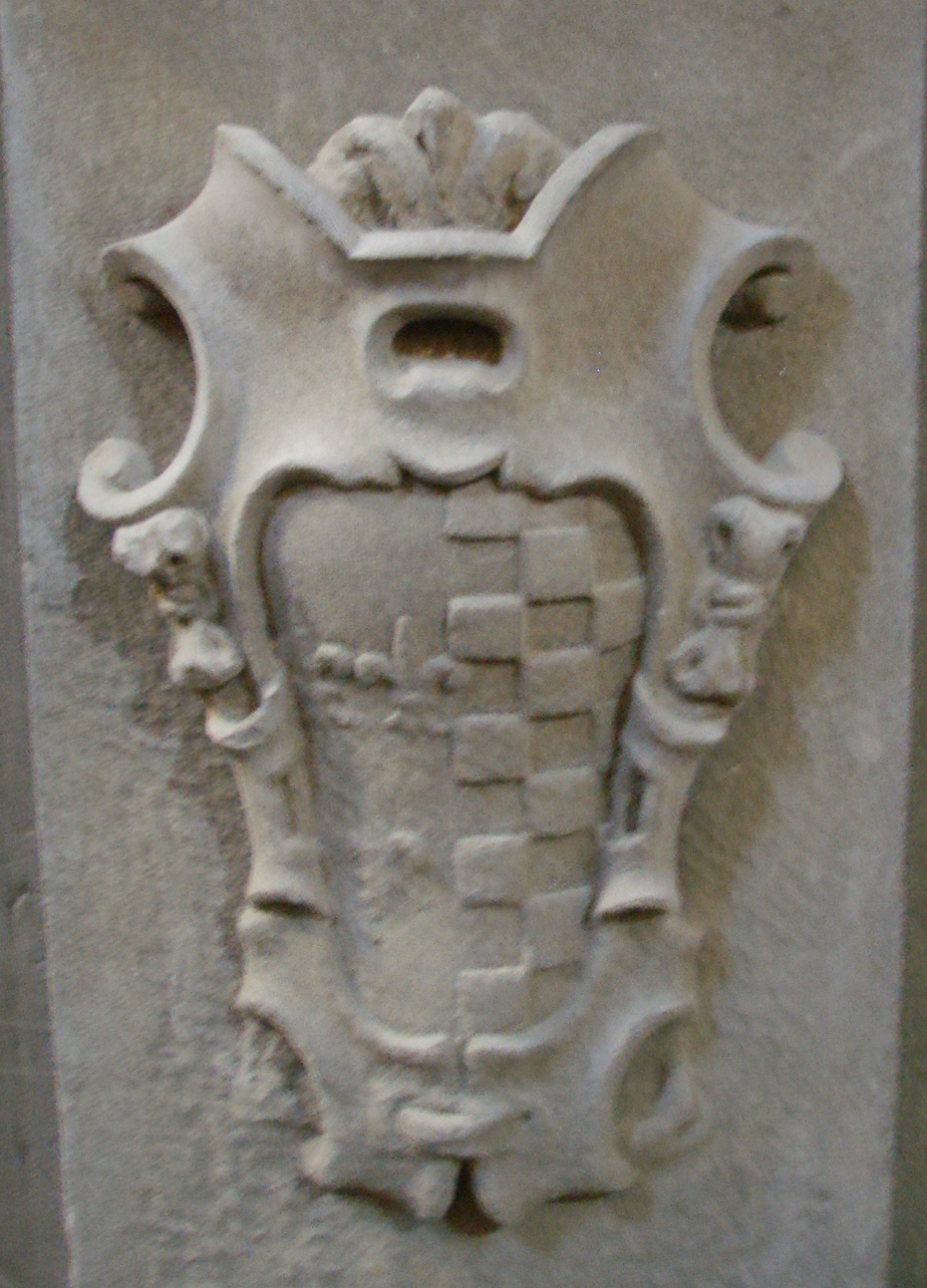 Santo Stefano al Ponte, stemma bartolommei